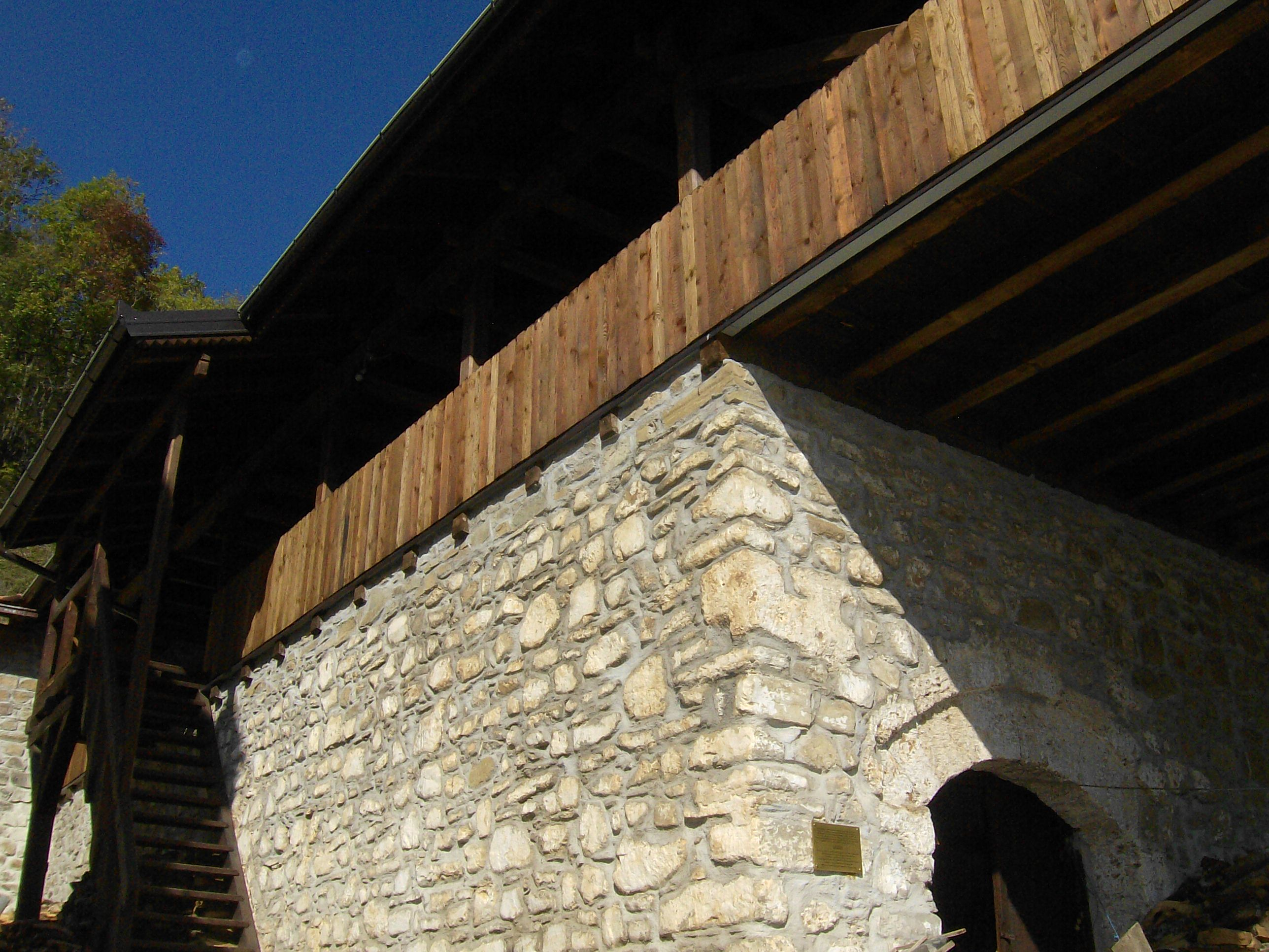 Manastir Sv.Arhangeli (Mihail i Gavril)- Kuceviste- konak